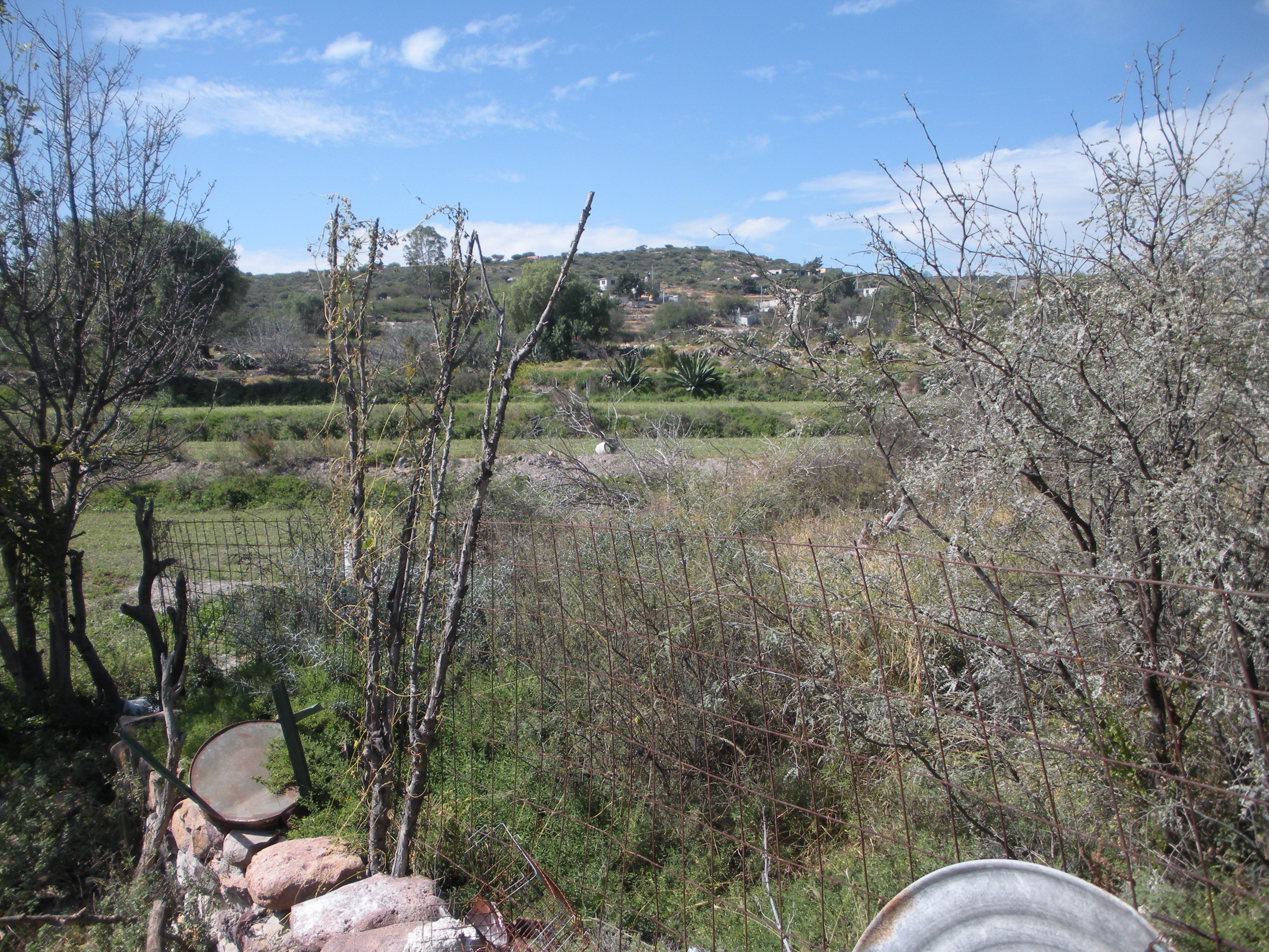 panorama en el botho cardonal hidalgo